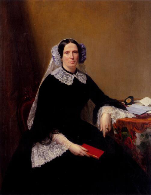 Portret van Prinses Marianne; geschilder voor of in 1880, waarschijnlijk ver ervoor. Auteursrecht was vanaf 1866 50 jaar na dood auteu